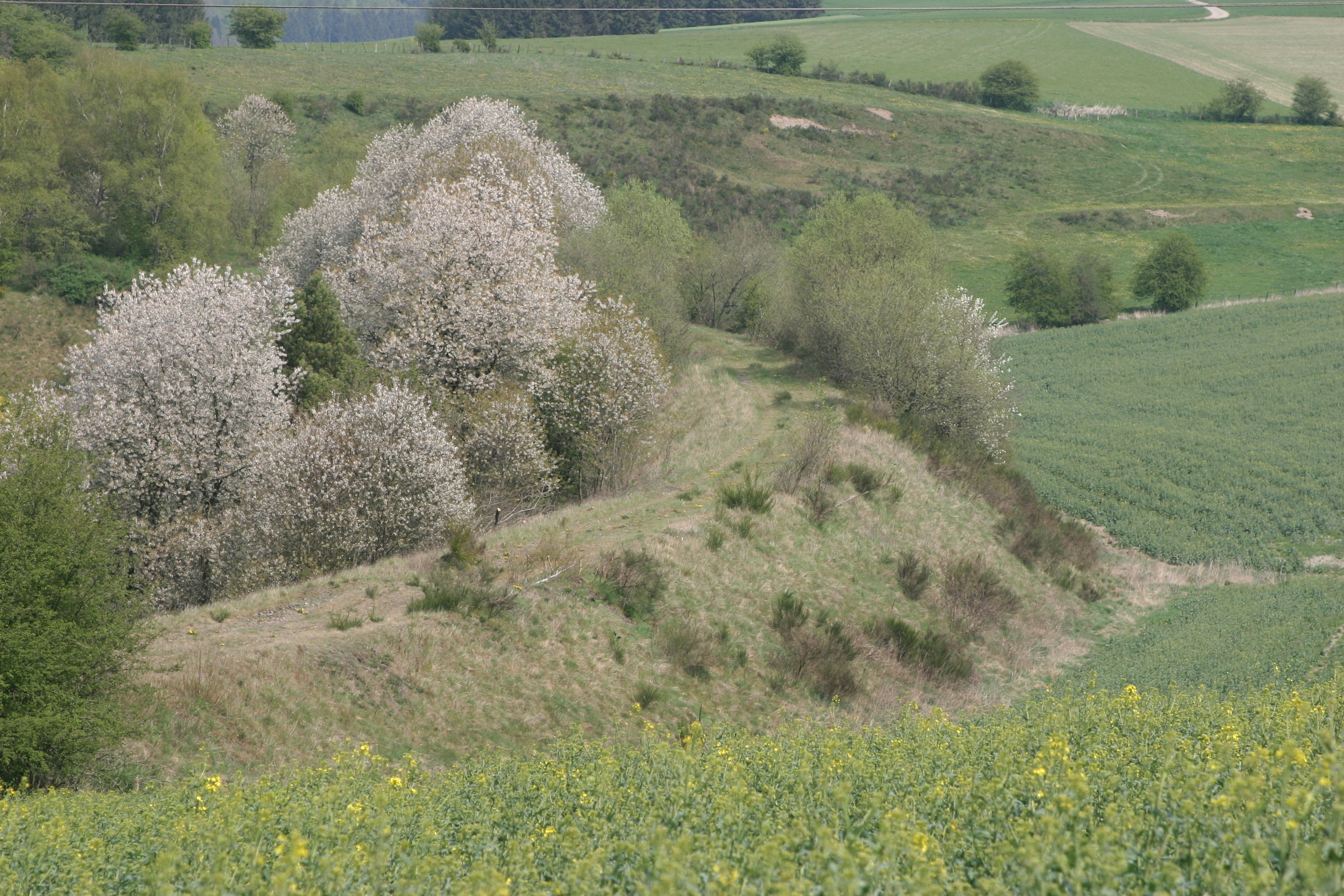 Eng Parti vun der fréierer Eisebunnsstreck Ëlwen - Sankt Vith ongeféier um PK 1,200 am Abrëll 2007.